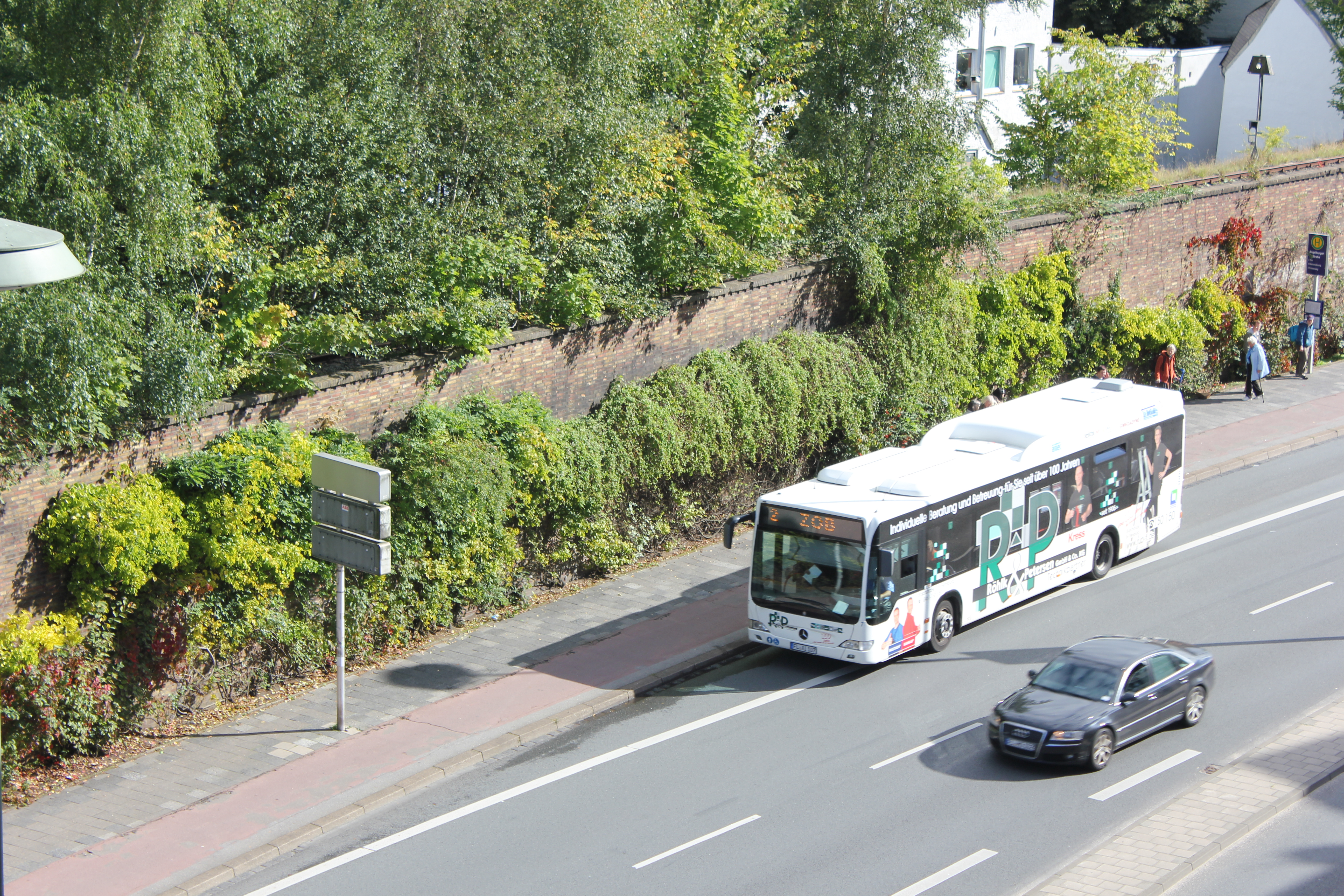 Blick auf den Flensburger Bahndamm, Bild 02